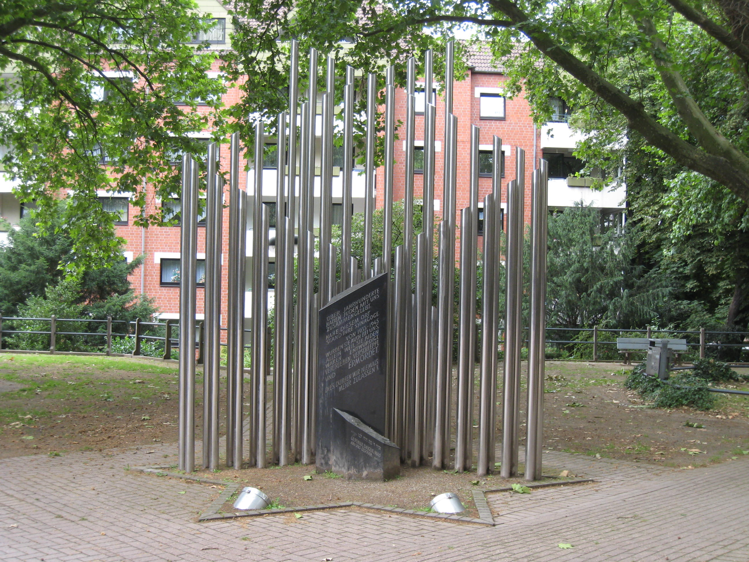 Denkmal zur Erinnerung an die alte Synagoge auf dem Friedrich-Ebert-Platz in Dortmund-Hörde